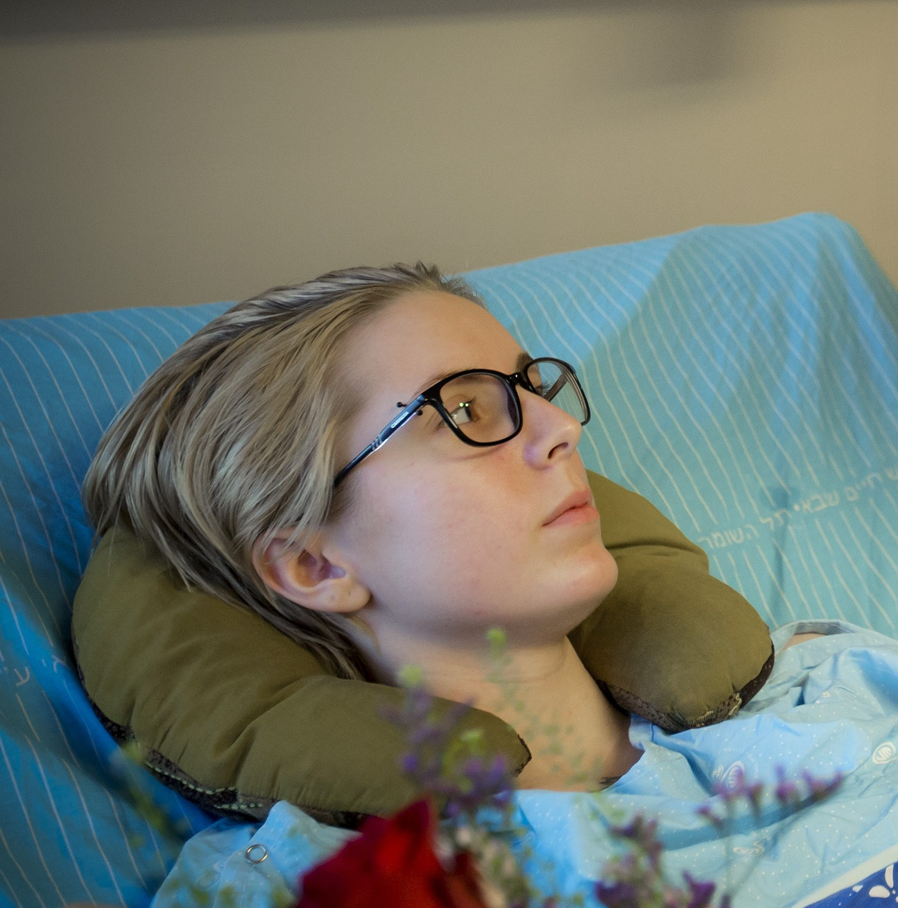 Президентське подружжя відвідало в ізраїльському госпіталі добровольця-медика Яну Зінкевич